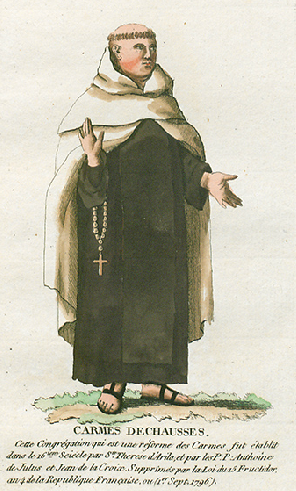 Collection de costumes de tous les ordres monastiques, supprimés à differentes époques, dans la ci-devant Belgique, Bruxelles, Philippe Joseph Maillart et sœur, 1811